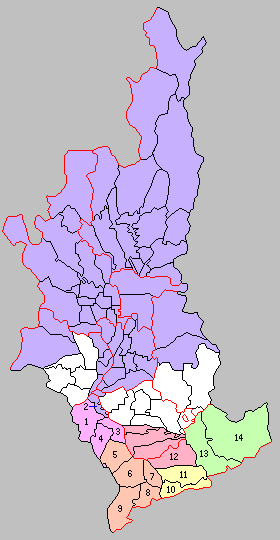 京都府綴喜郡の町村制時点の町村。